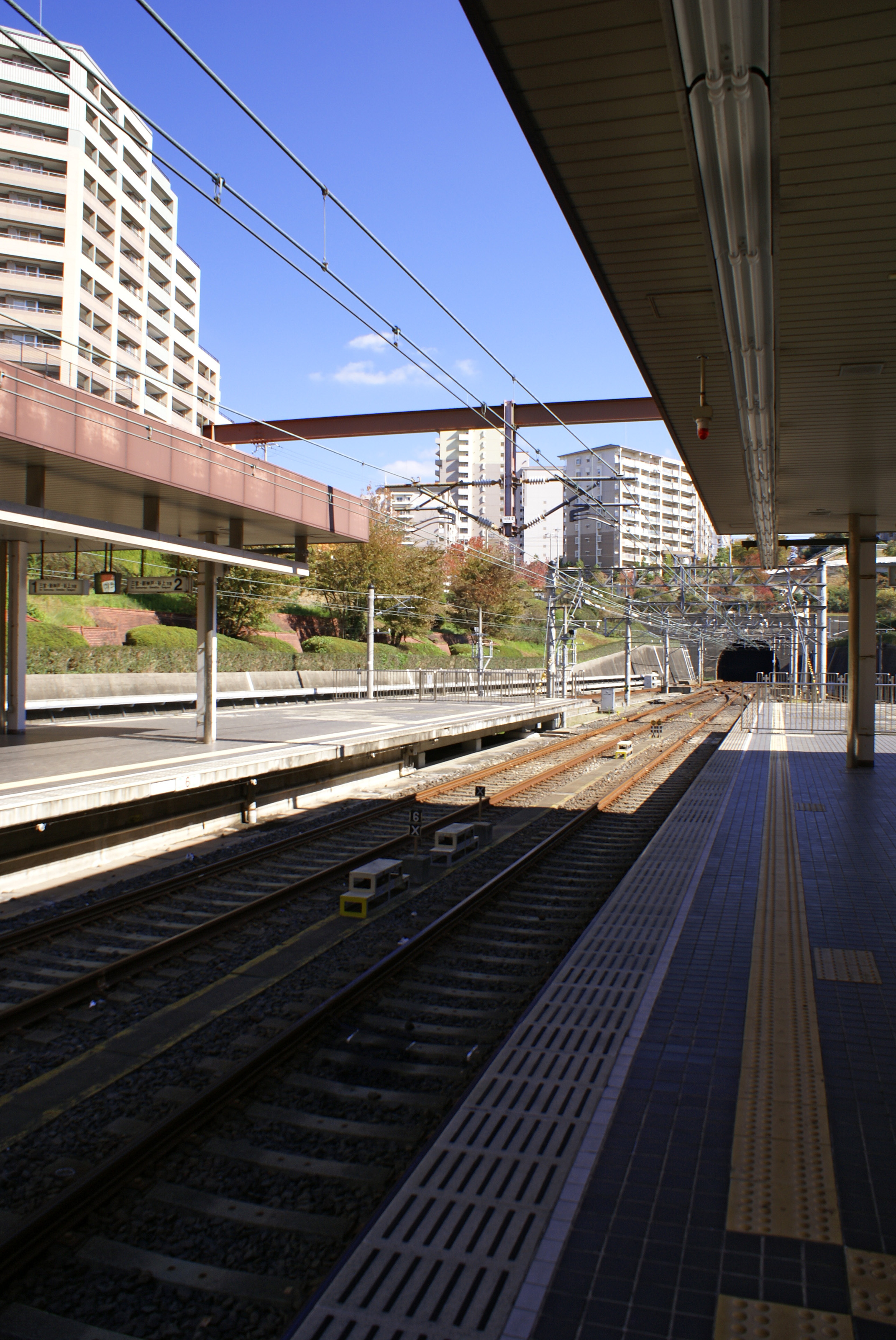 Myodani Station in Kobe, Hyogo, Japan